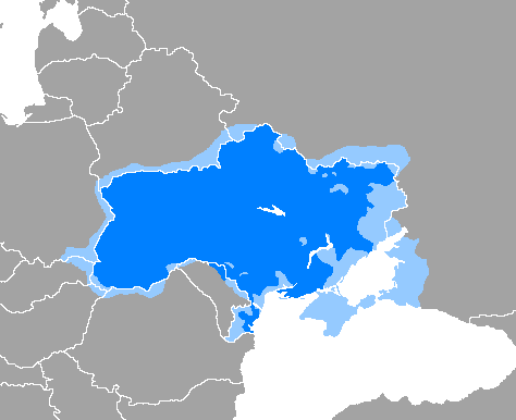 Idioma ucraniano: mayoria y minoria. Тоҷикӣ: Харитаи гӯяндагони забони украинӣ